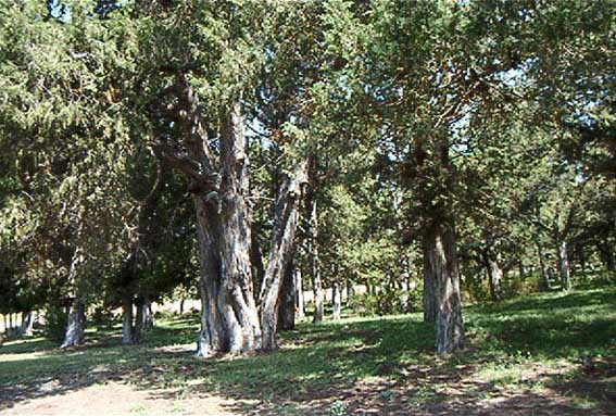 Calatañazor - Sabinar Esta foto está realizada por mi; la cedo a Wikipedia